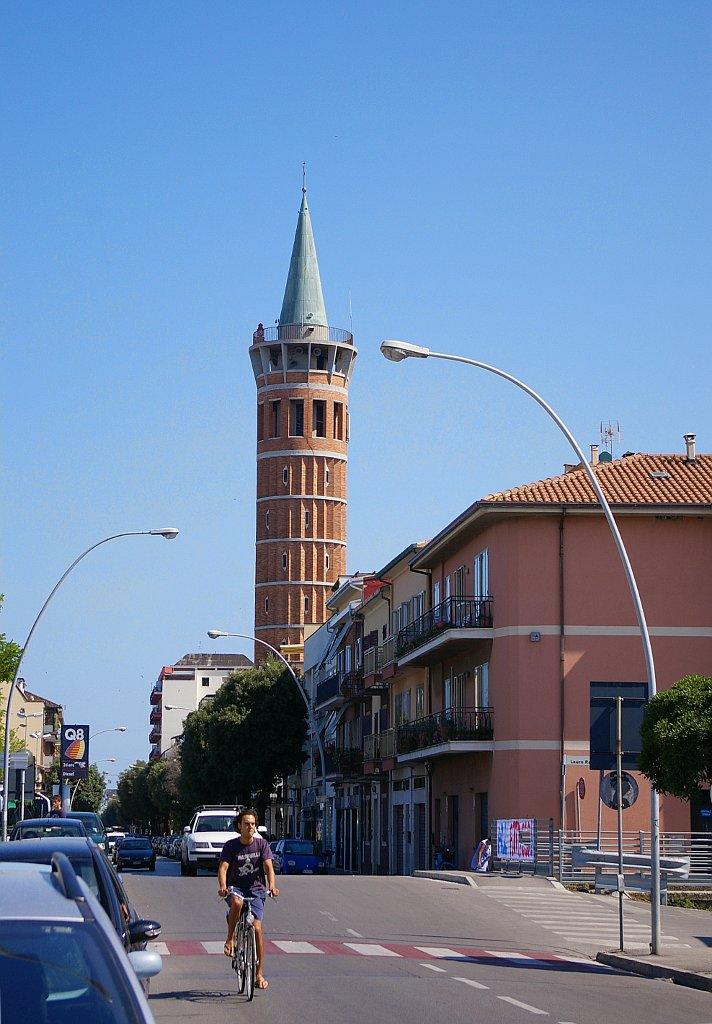 Chiesa di Christo Re, campanile e faro